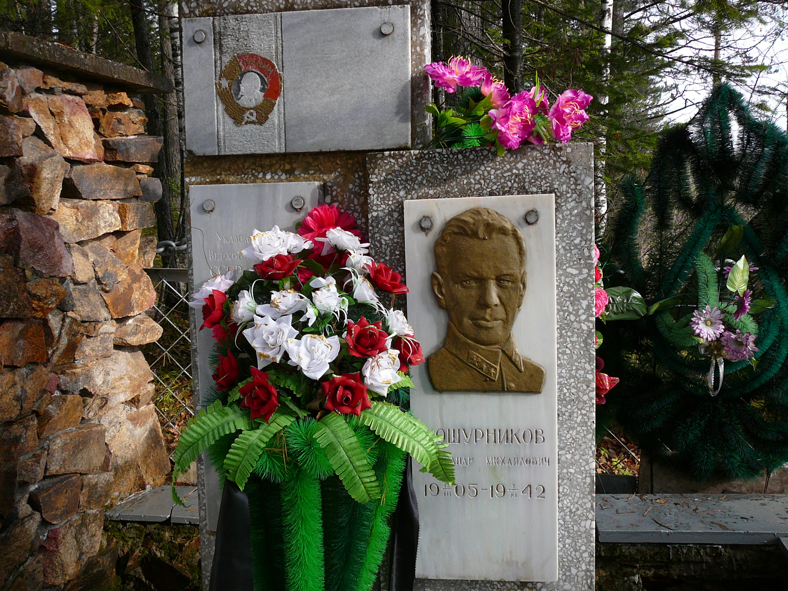 Место смерти и захоронения А.М.Кошурникова на берегу реки Мана (близ одноименной станции Кошурниково)